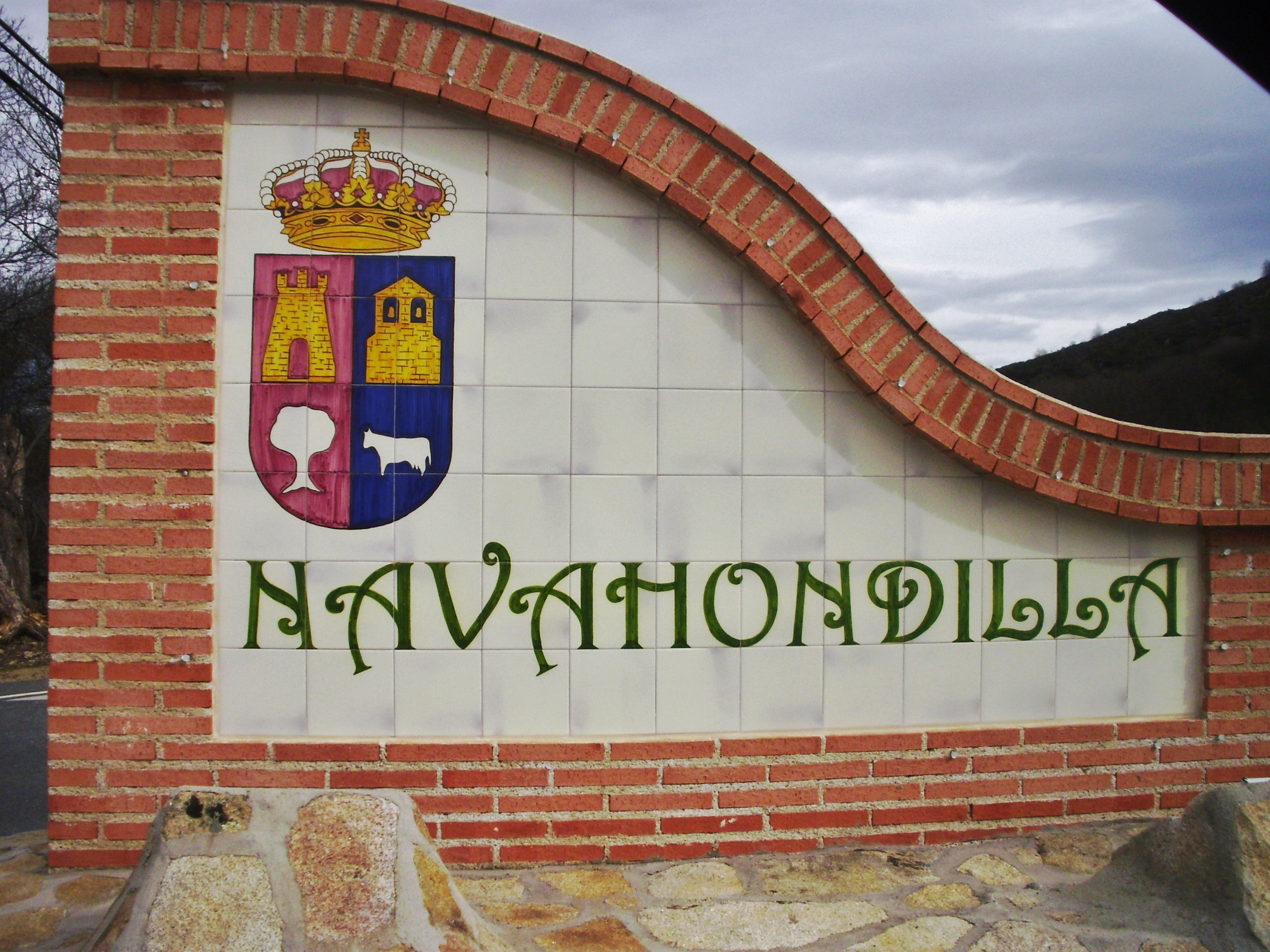 Desvío de la carretera N-501 en dirección a la localidad de Navahondilla, Ávila, España.